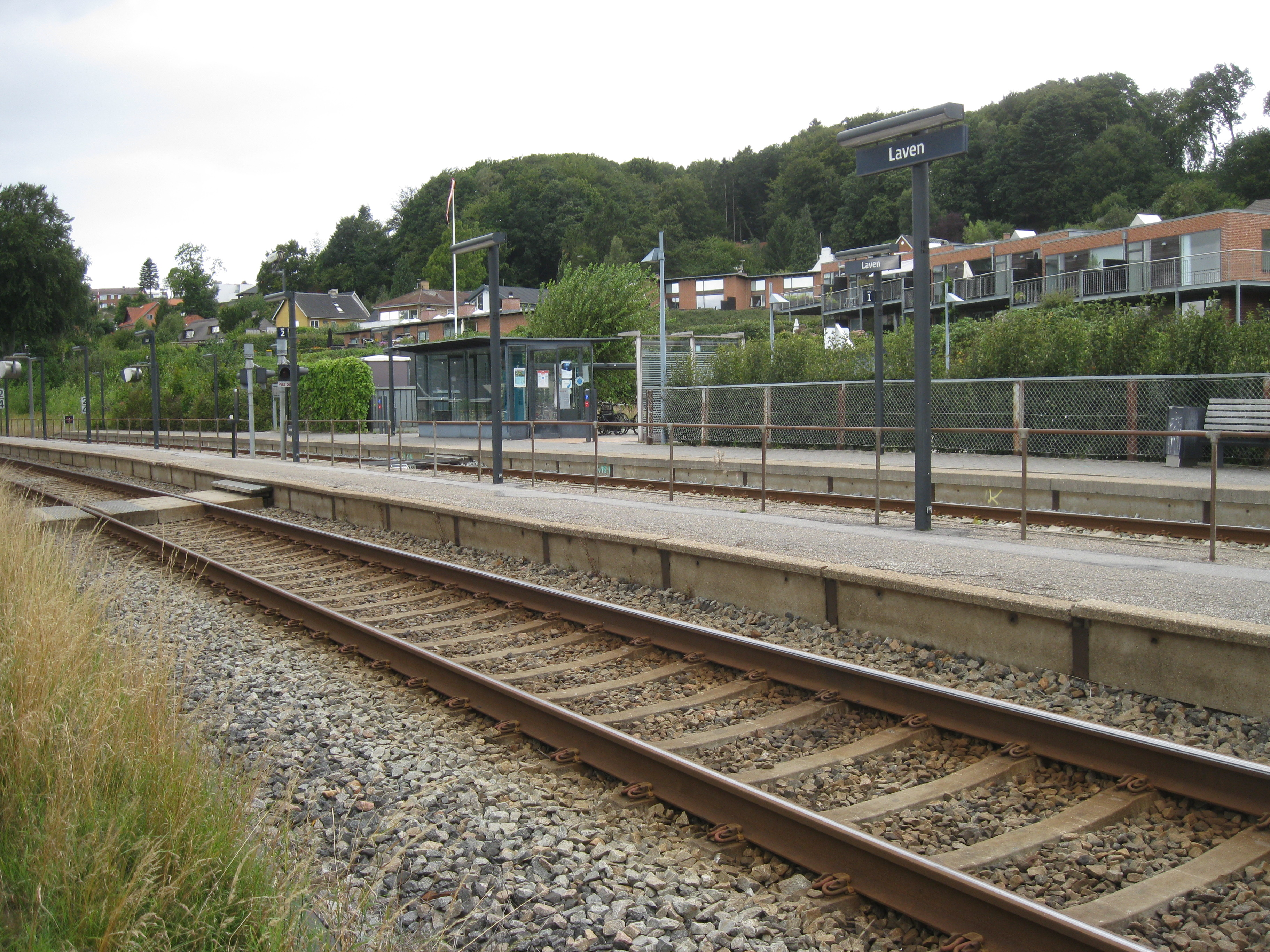 Laven Station